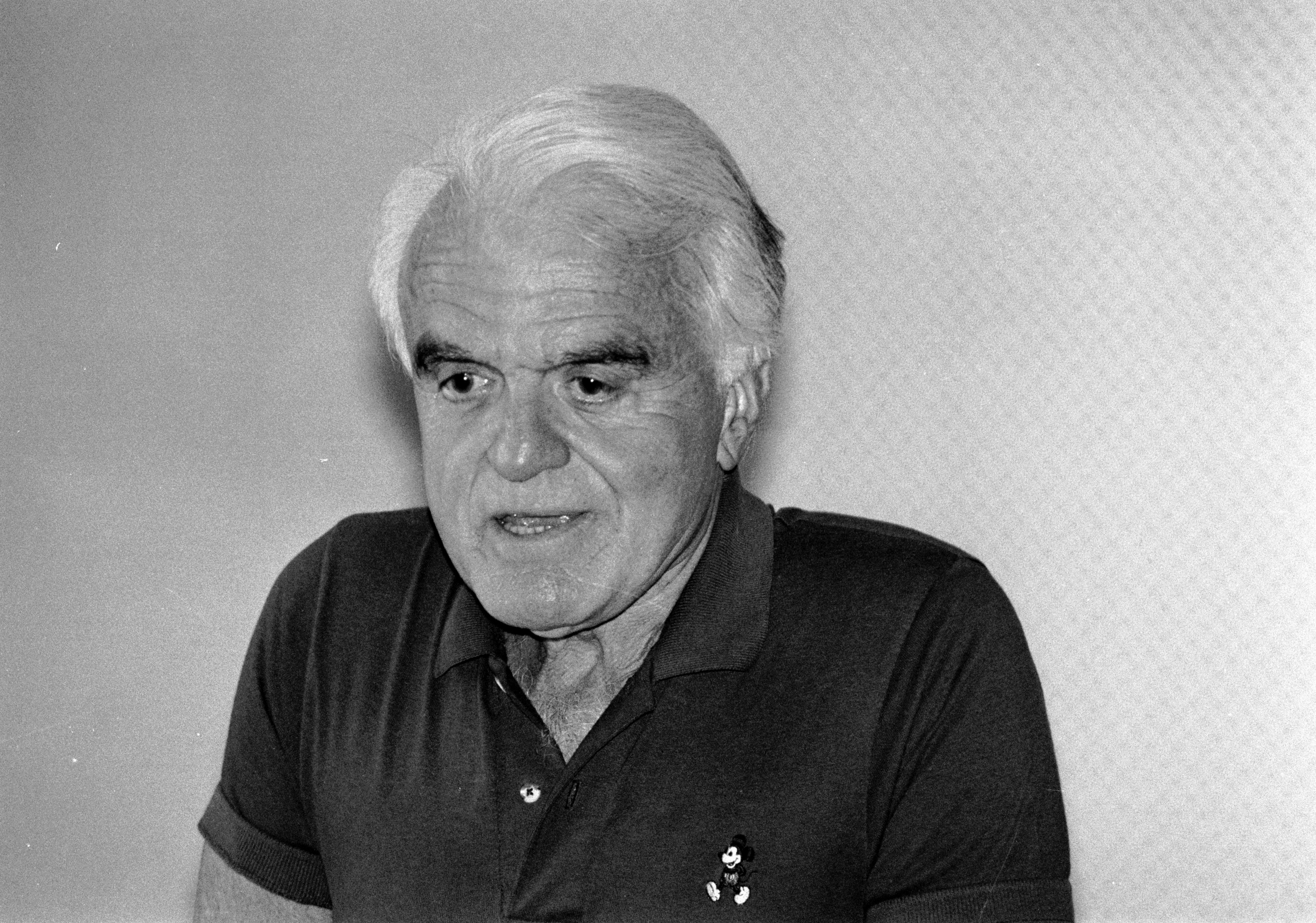 Jack Valenti au Festival du cinéma américain de Deauville (Normandie, France).